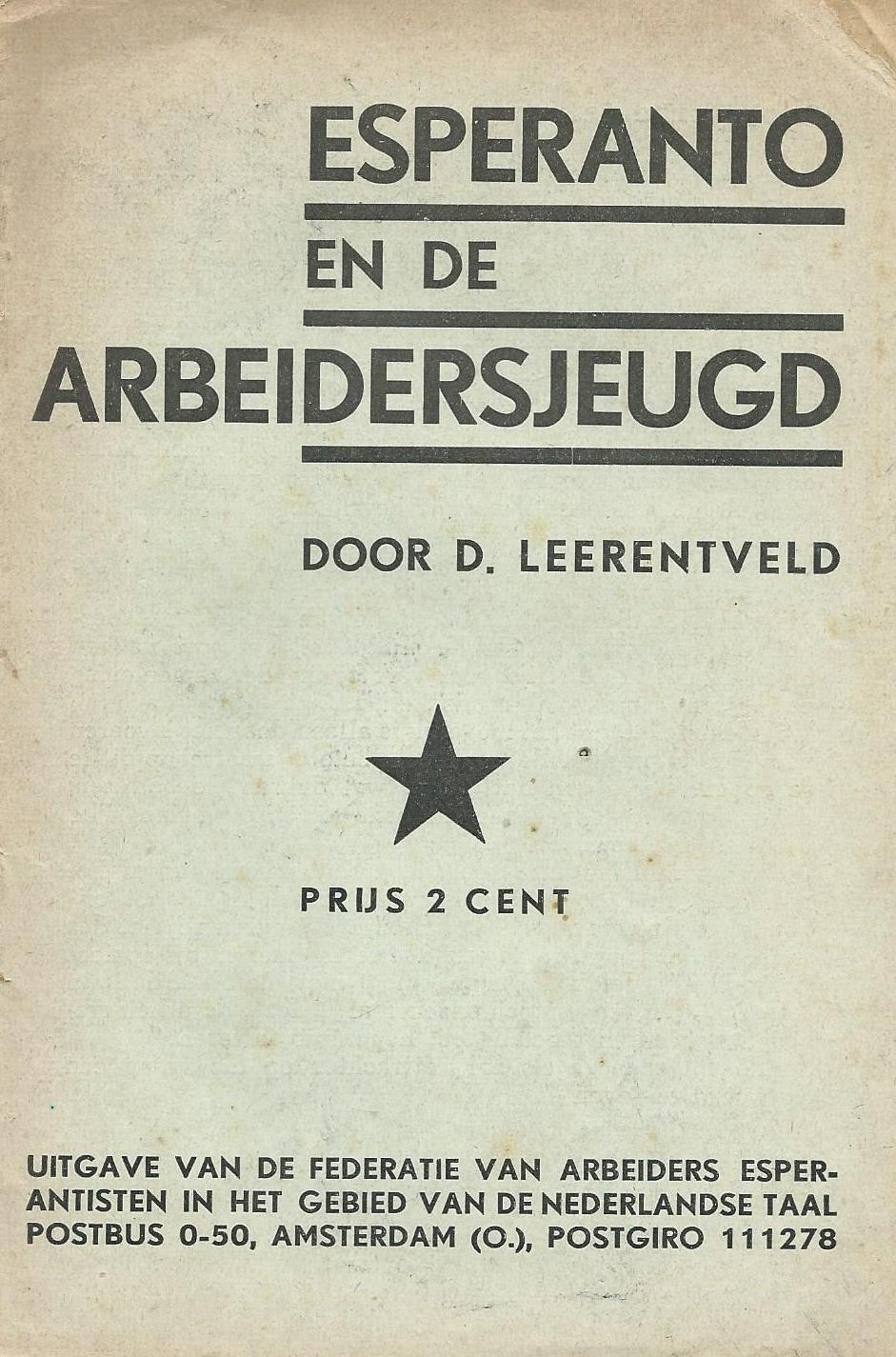 librokovrilo de "Esperanto en de Arbeidersjeugd", 1934